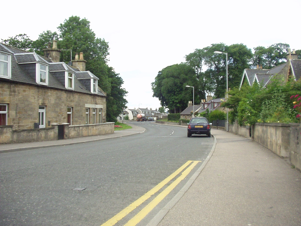 Lhanbryde main road